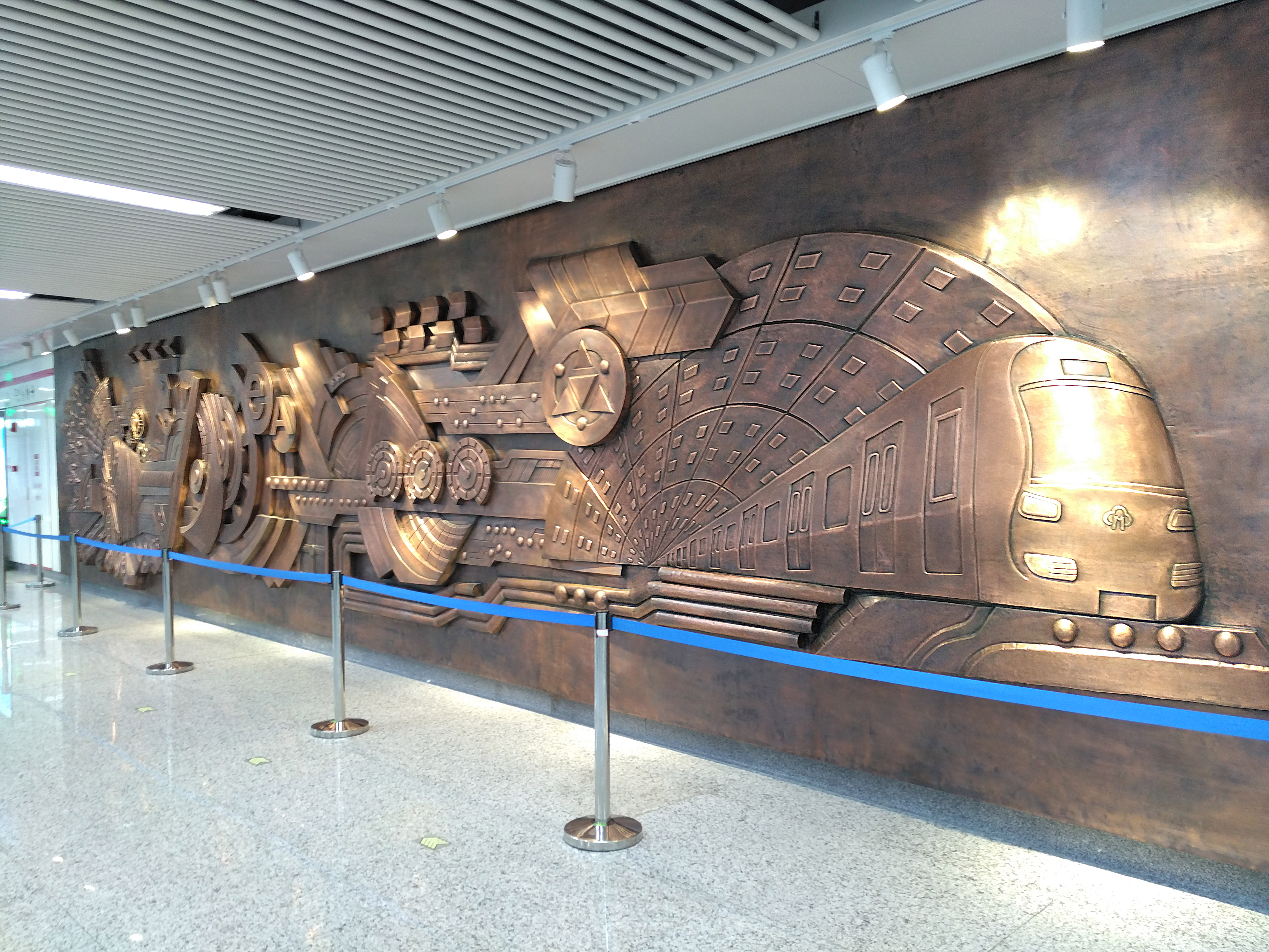 位于福州地铁达道站的《地铁风采》浮雕艺术墙，由程俊华、王云鹏创作。